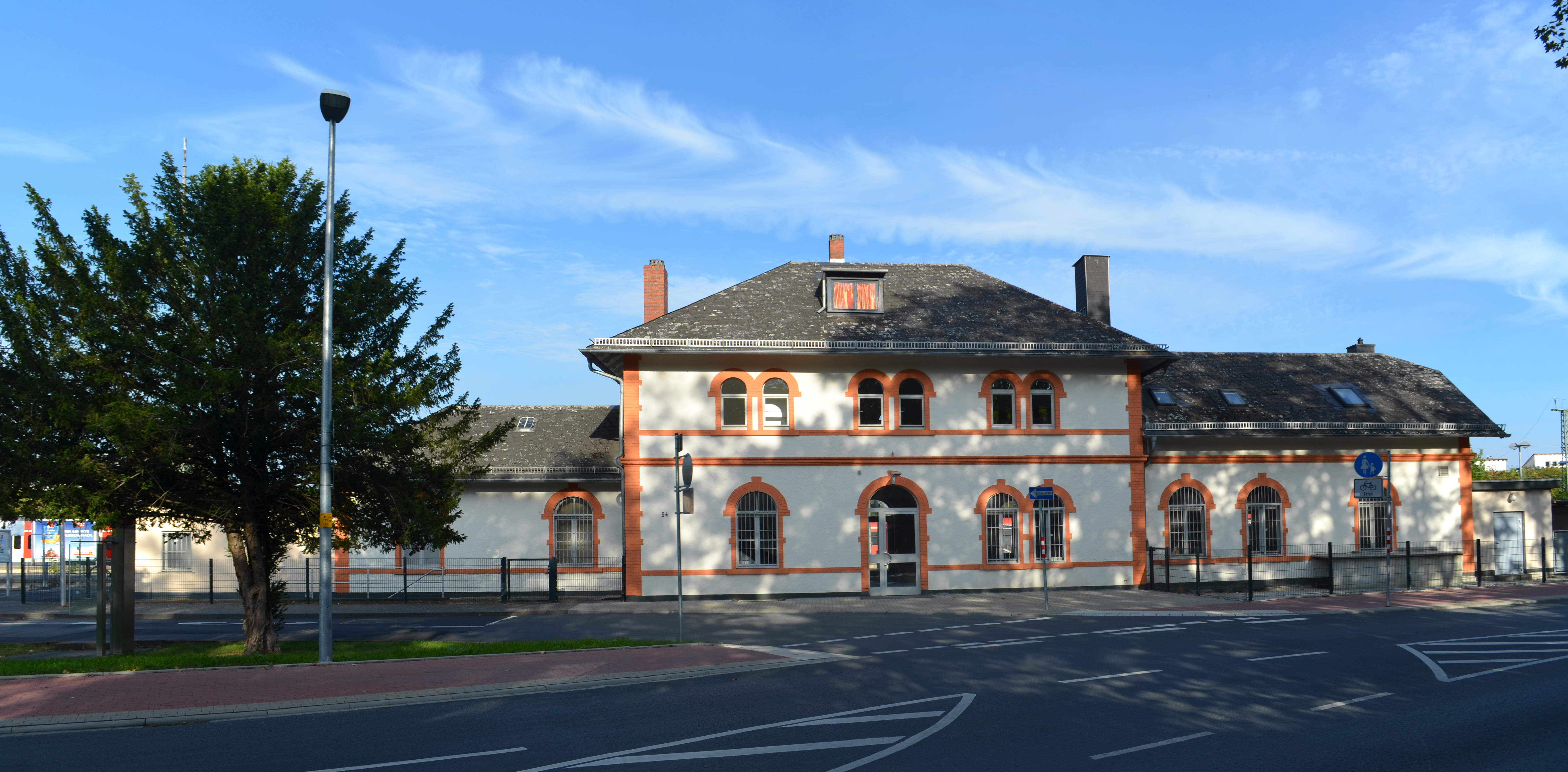 Friedrichsdorf, Bahnstraße 54, Rückseite